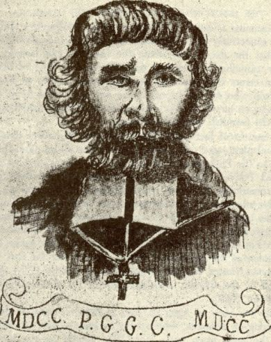 Georg Joseph Kamel (1661-1706), jezuitský misionář, lékárník a botanik